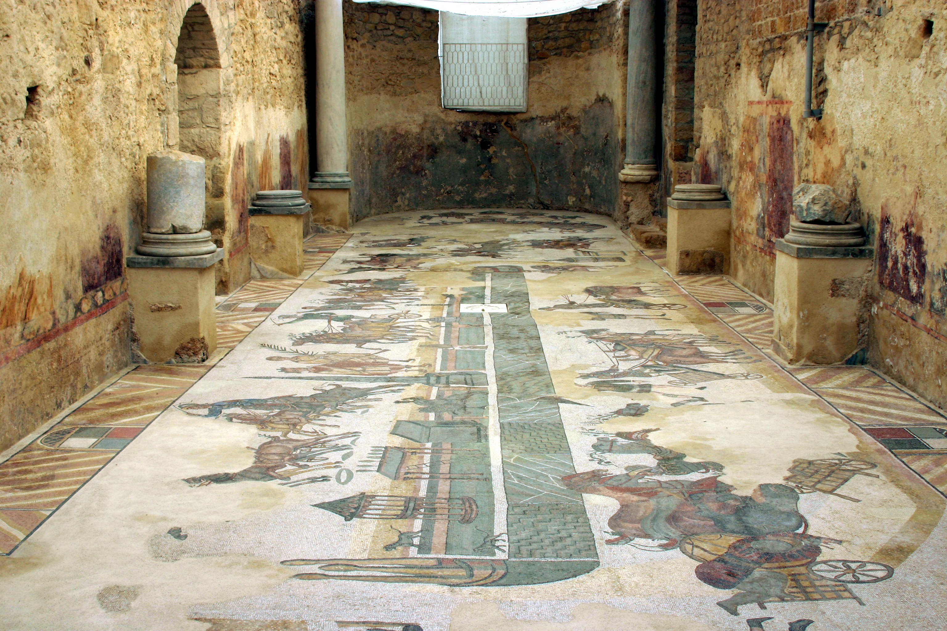 Villa Romana del Casale